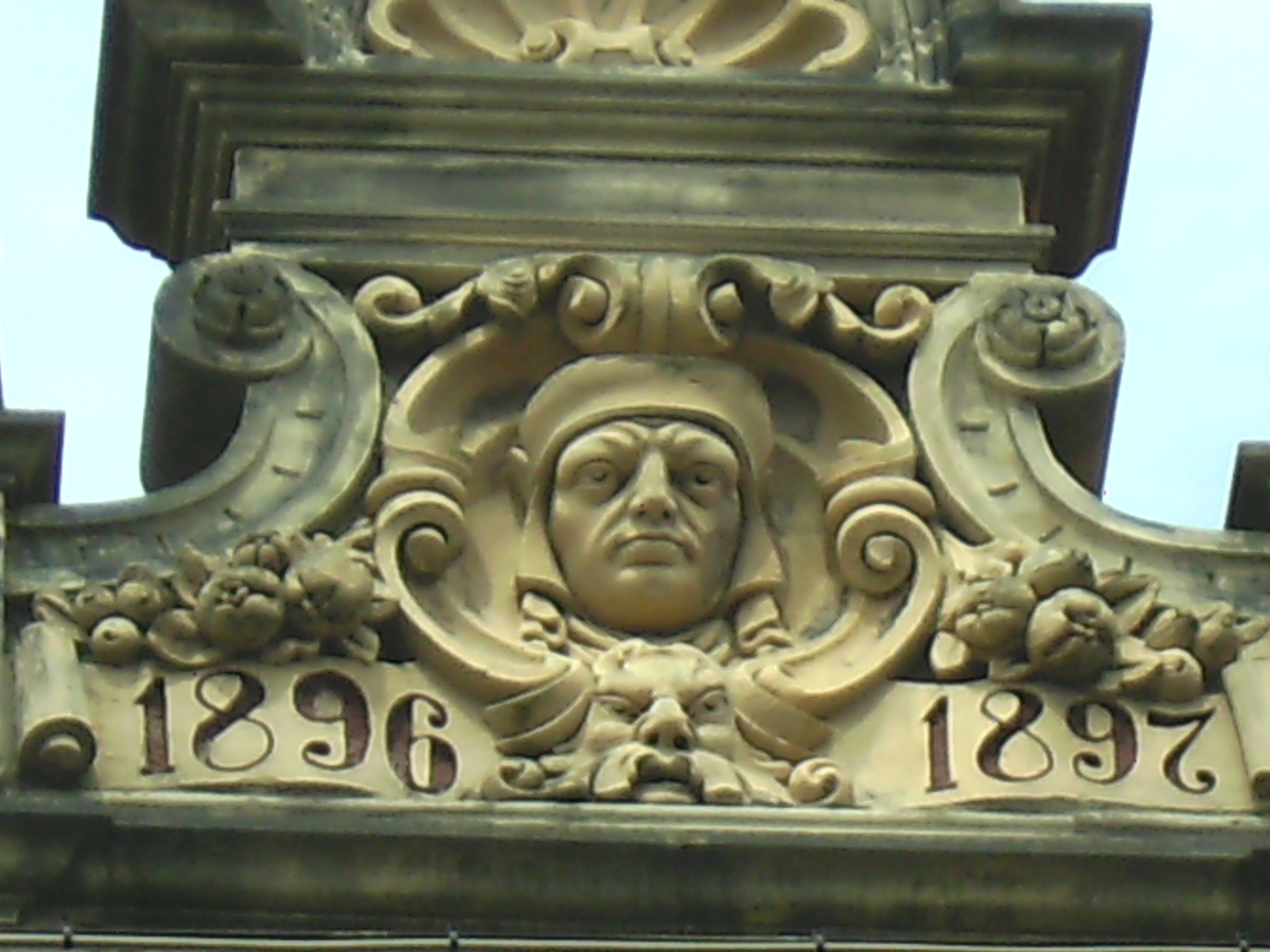 Saarbrücken: Sandsteinverzierungen 1896/97 (Mainzer Strasse)